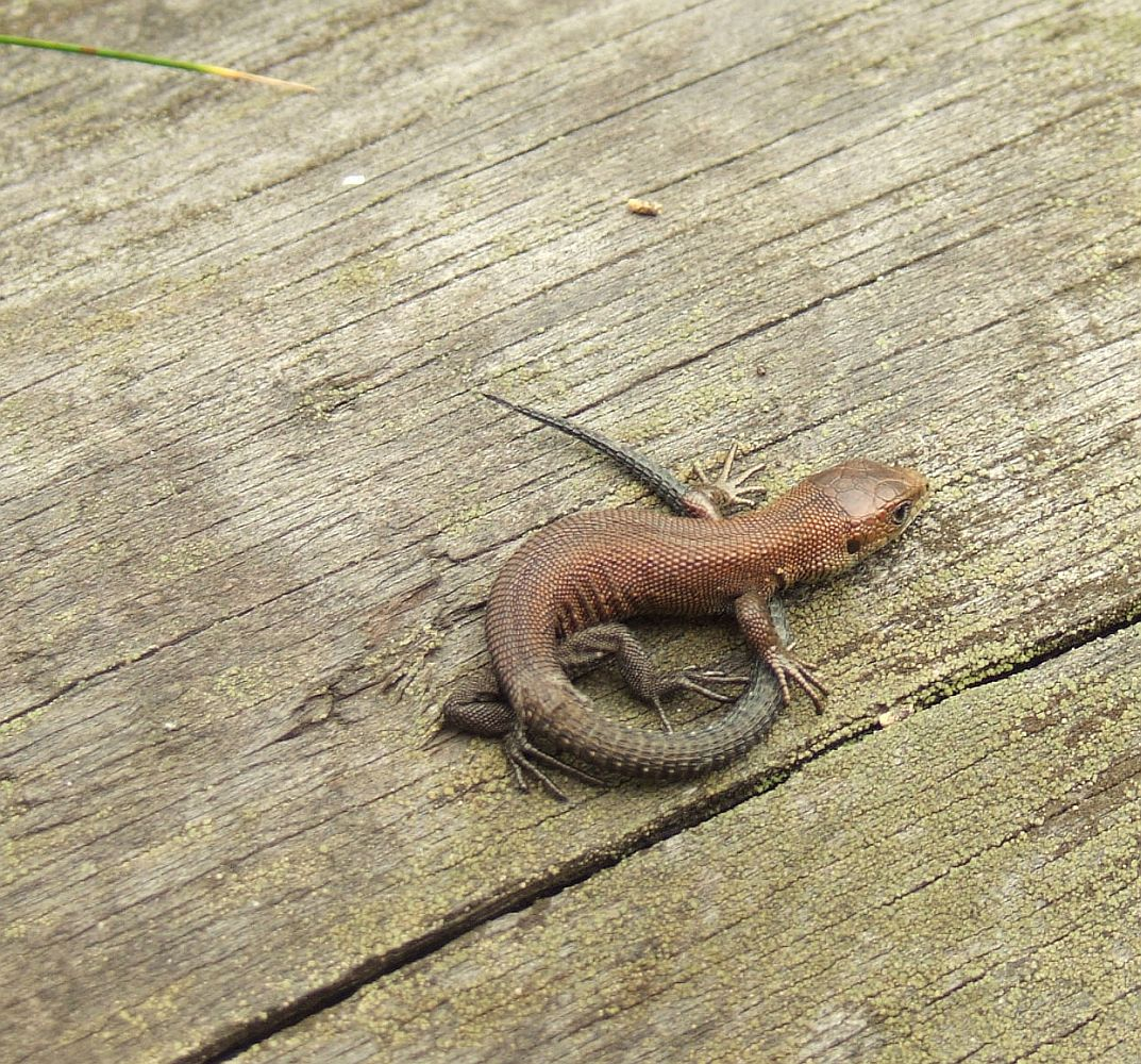 Gyvavedis driežas (lot. Lacerta vivipara, angl. Viviparous Lizard t.p. Common Lizard, vok. Waldeidechse) Paneriuose.